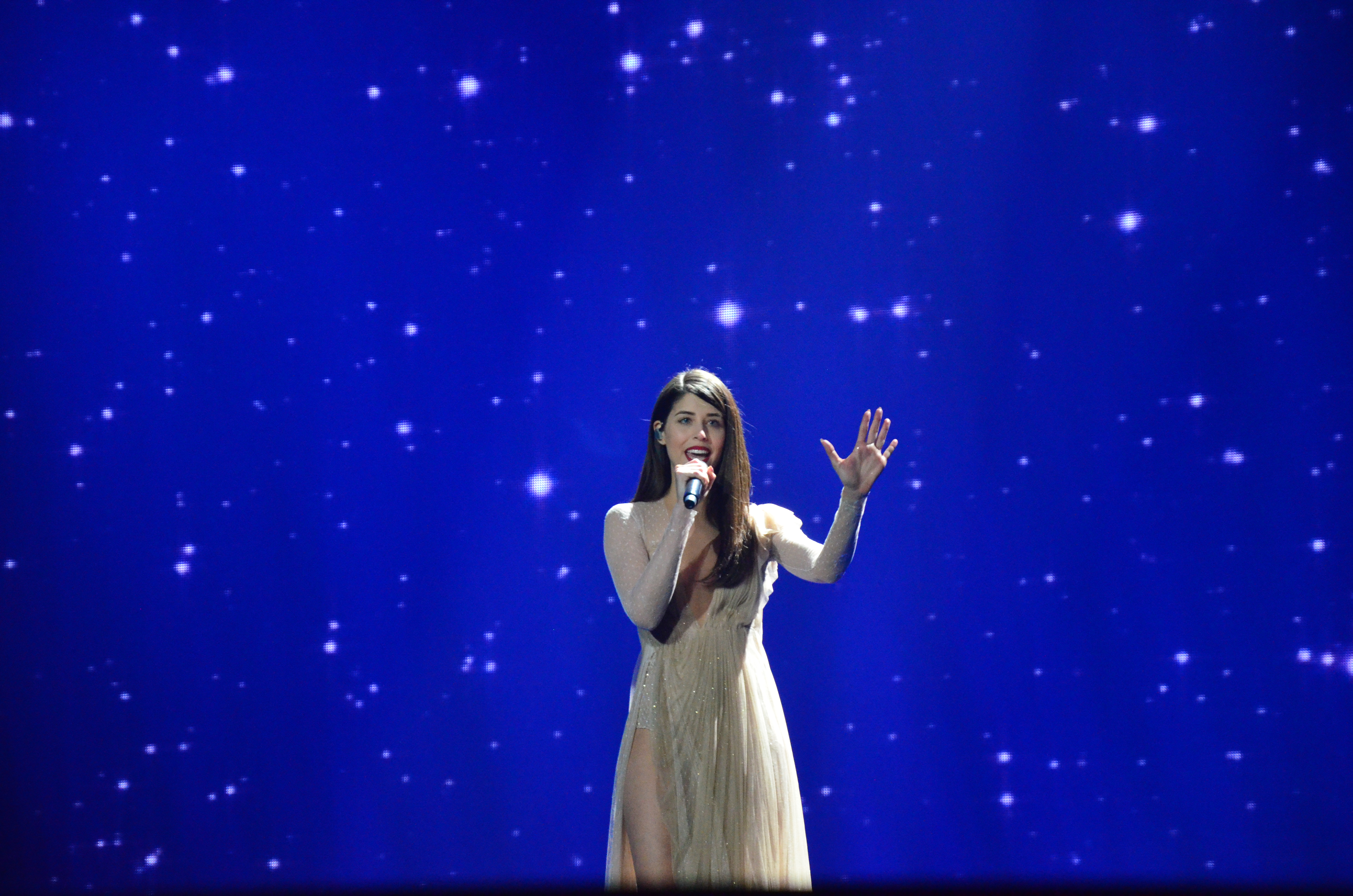 12 травня. Генеральна репетиція фіналу Євробачення 2017. Demy (Greece).